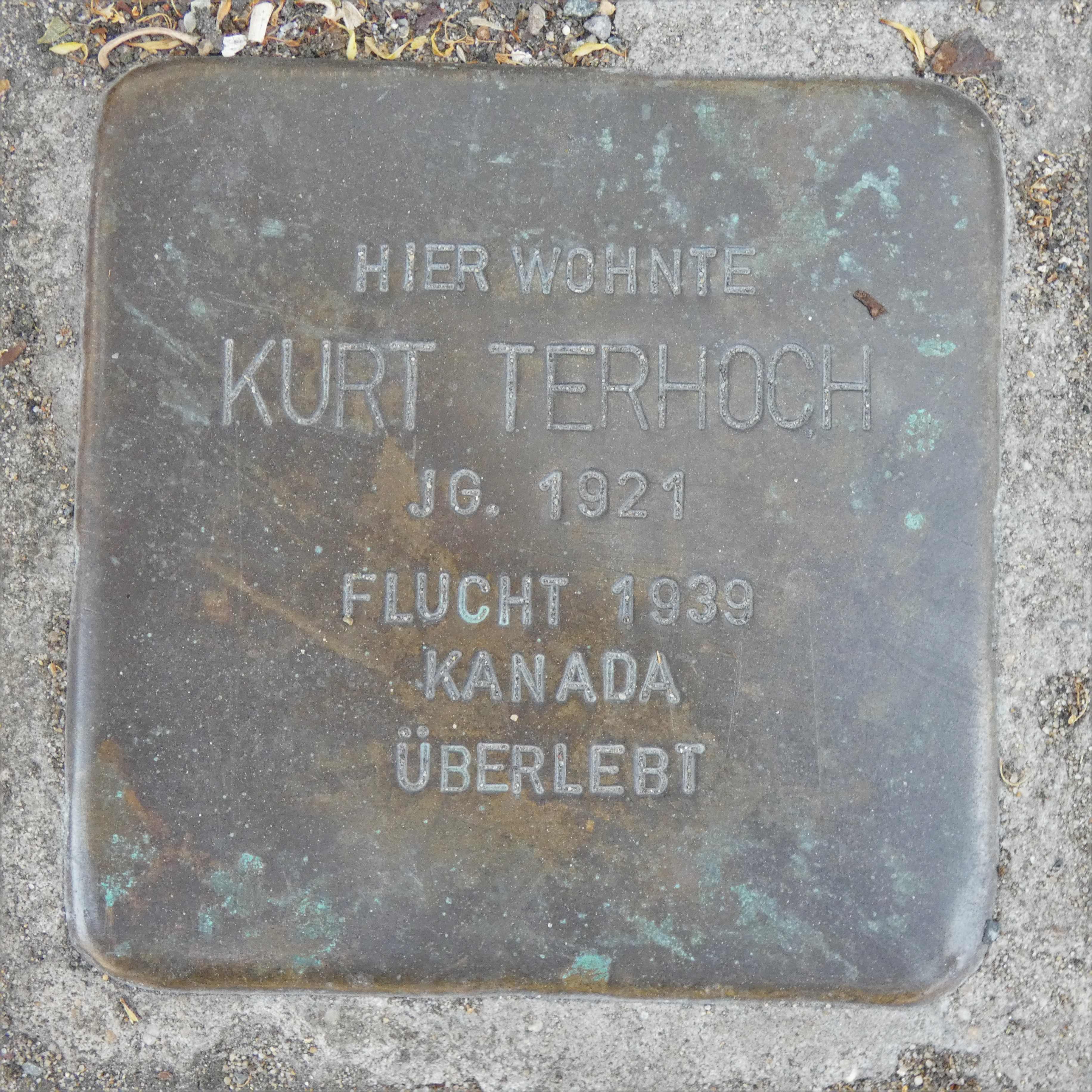 Hier wohnte Kurt Terhoch, Jg. 1921, Flucht 1939 Kanada, überlebt